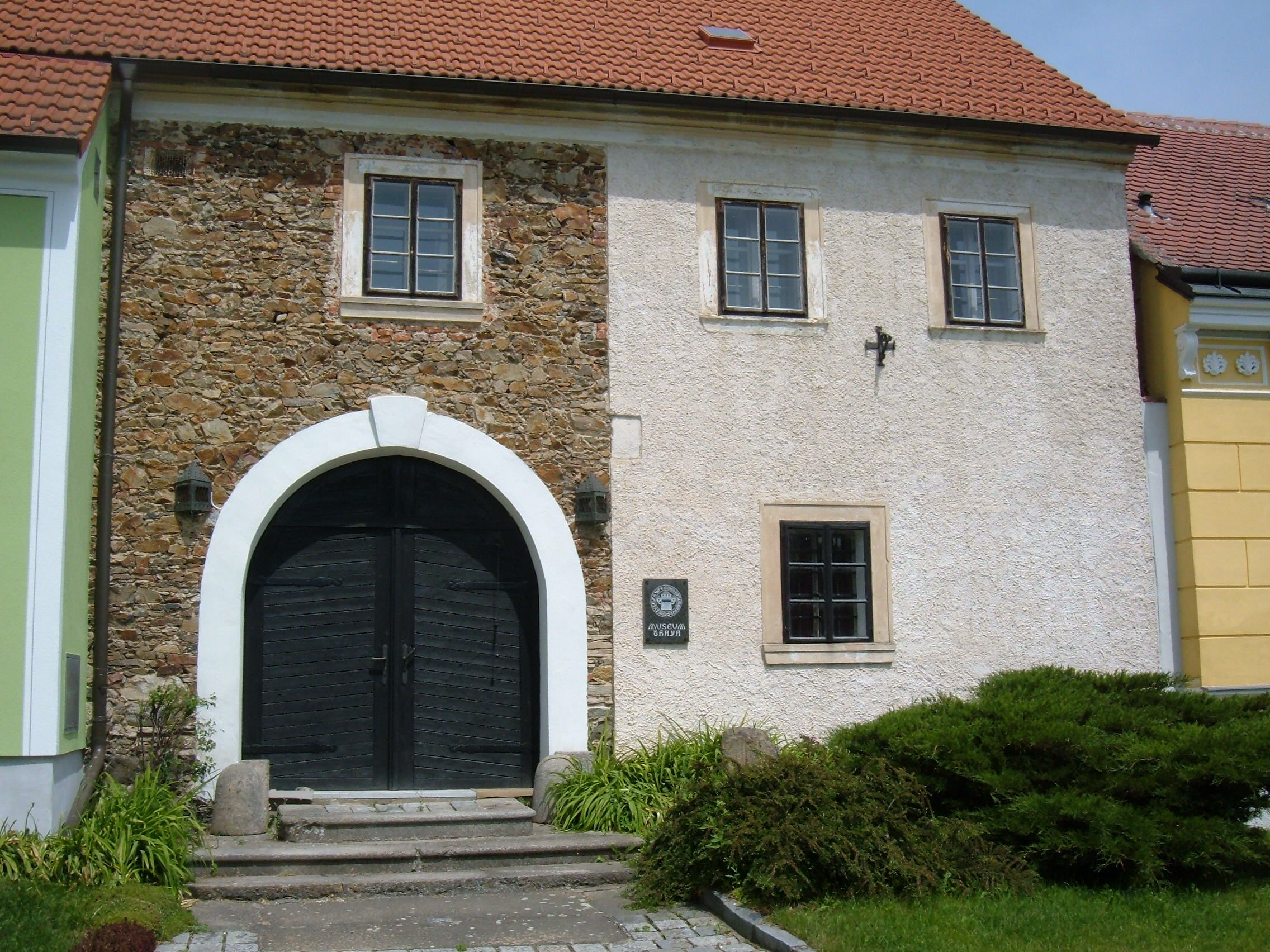 Das Museumsgebäude in Thaya, Bahnhofstraße 1